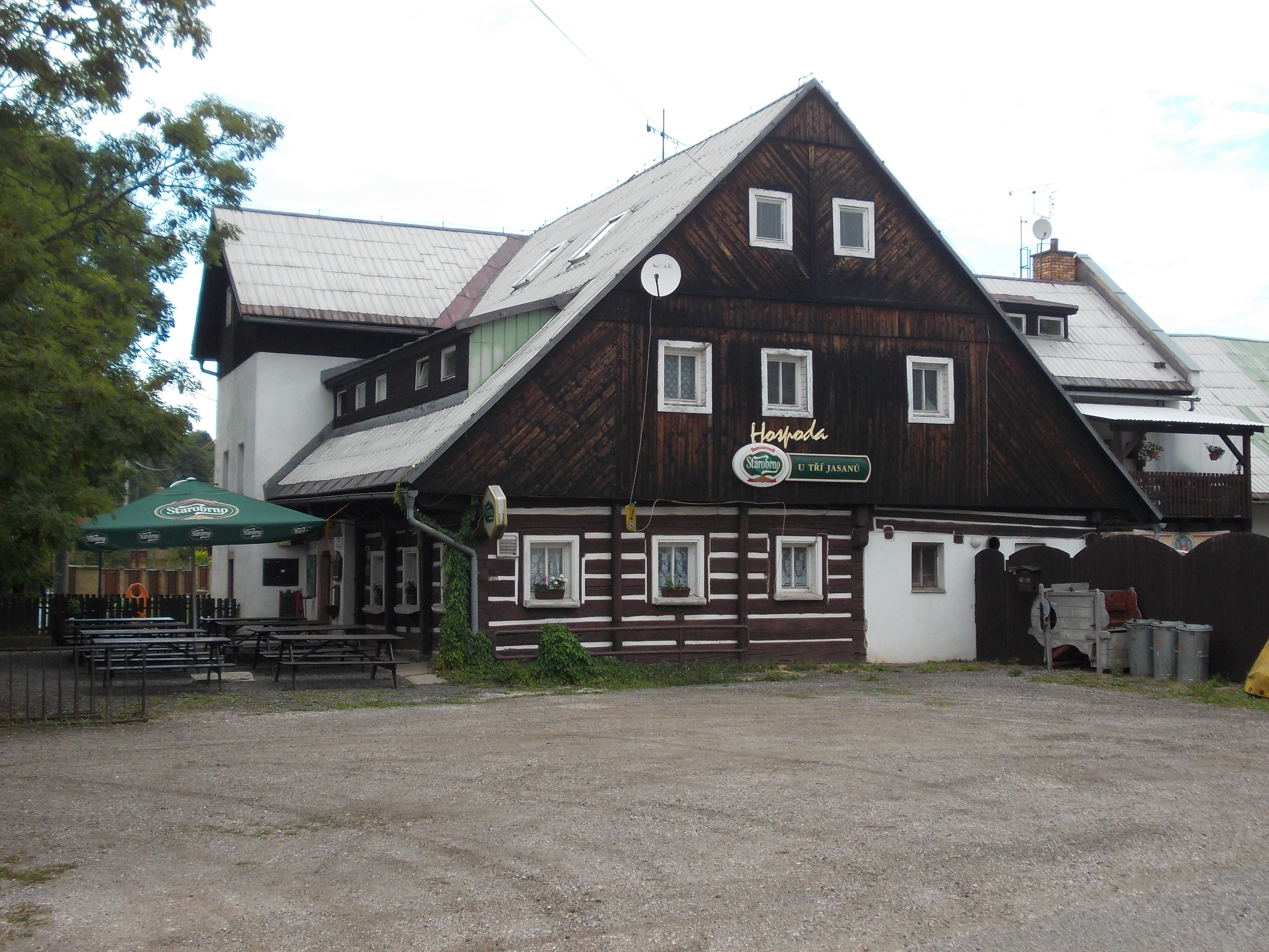 Prosečné - č.p. 63